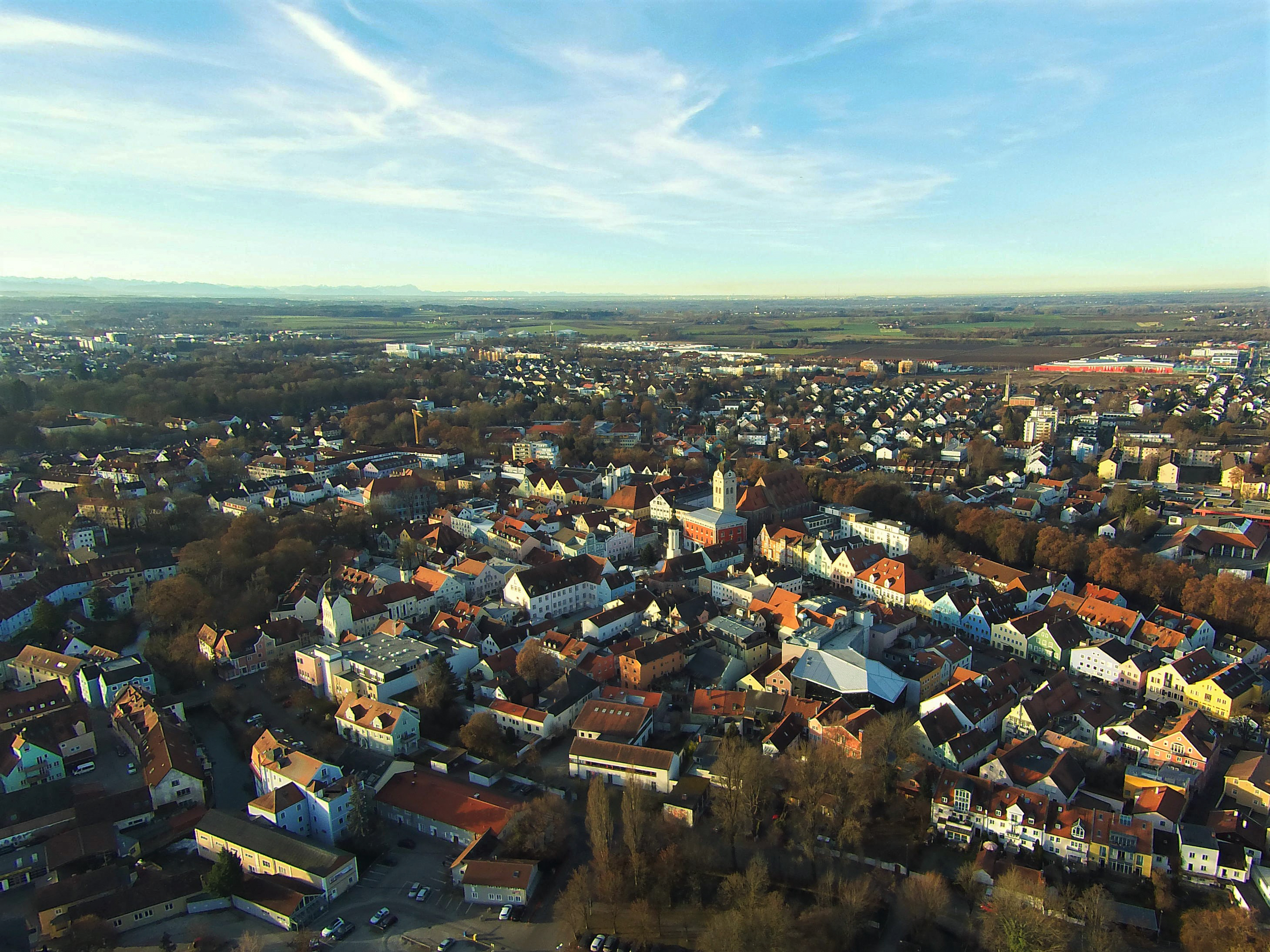 Das Luftbild zeigt die Bayrische Stadt Erding bei München im Herbst.